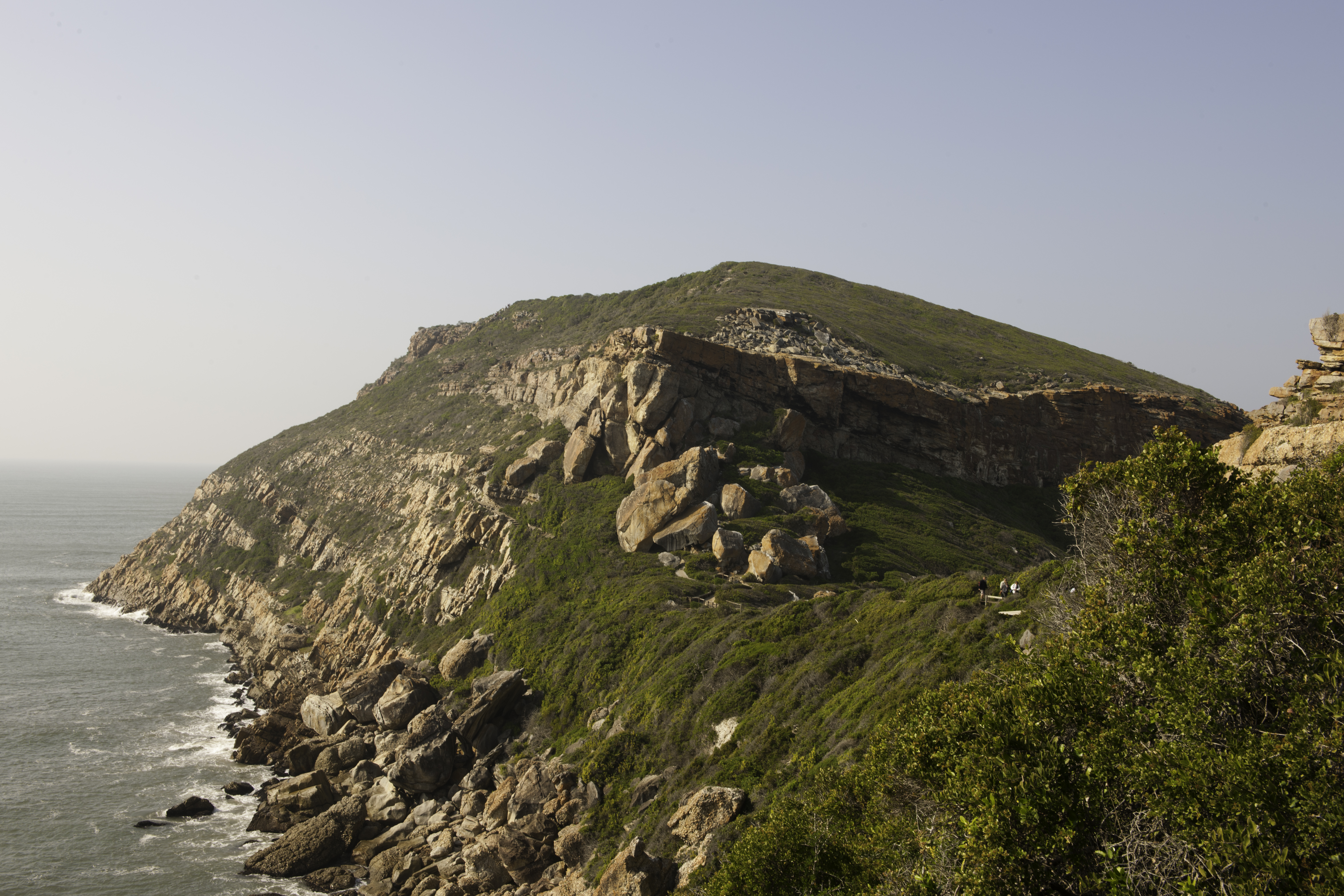 Robberg Peninsula near Plettenberg Bay